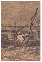 Druksel uit 1831. Bewerkt door mijzelf (vergroot)